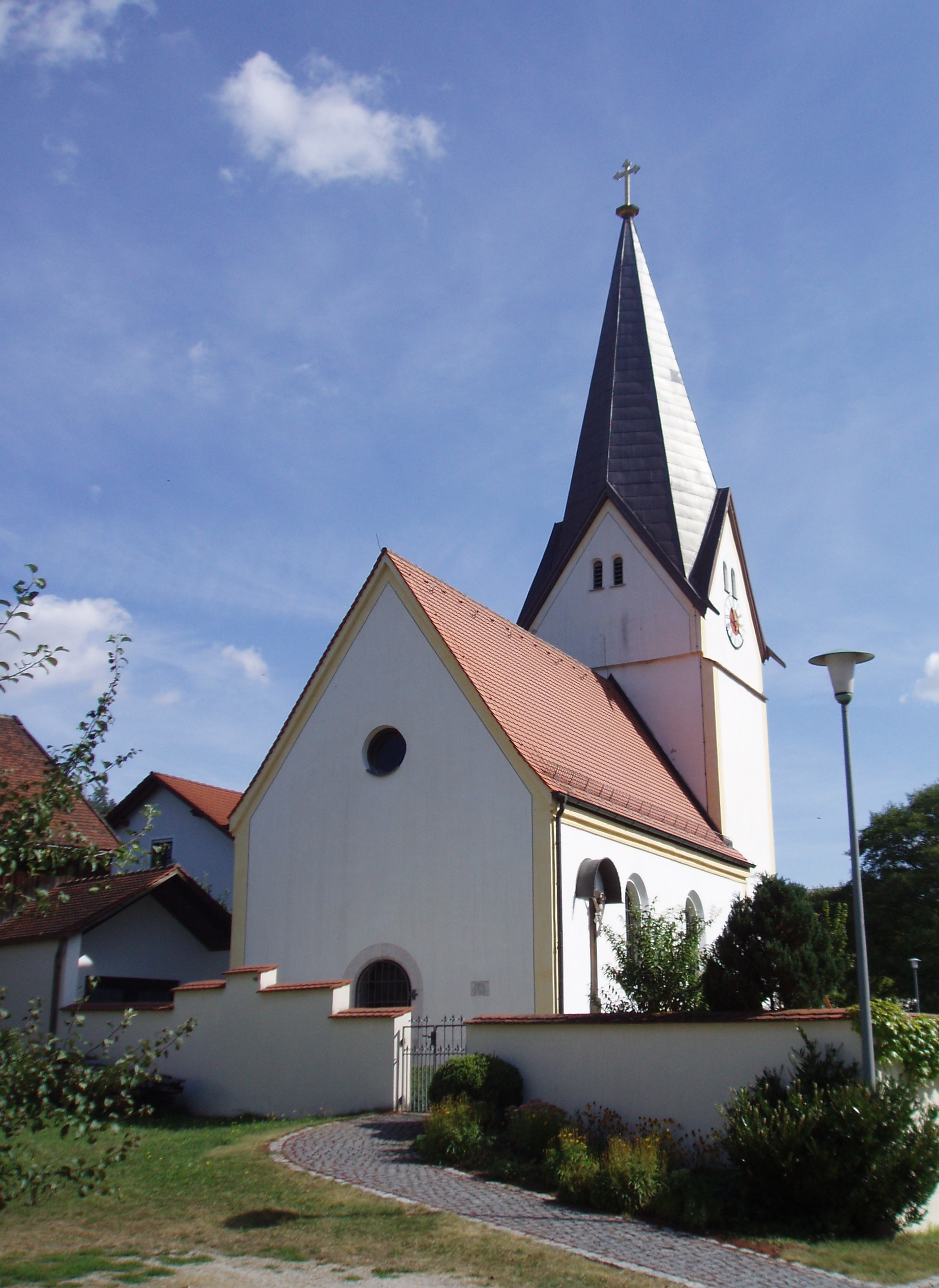 Ottmaring_bei_Dietfurt_Kirche_außen